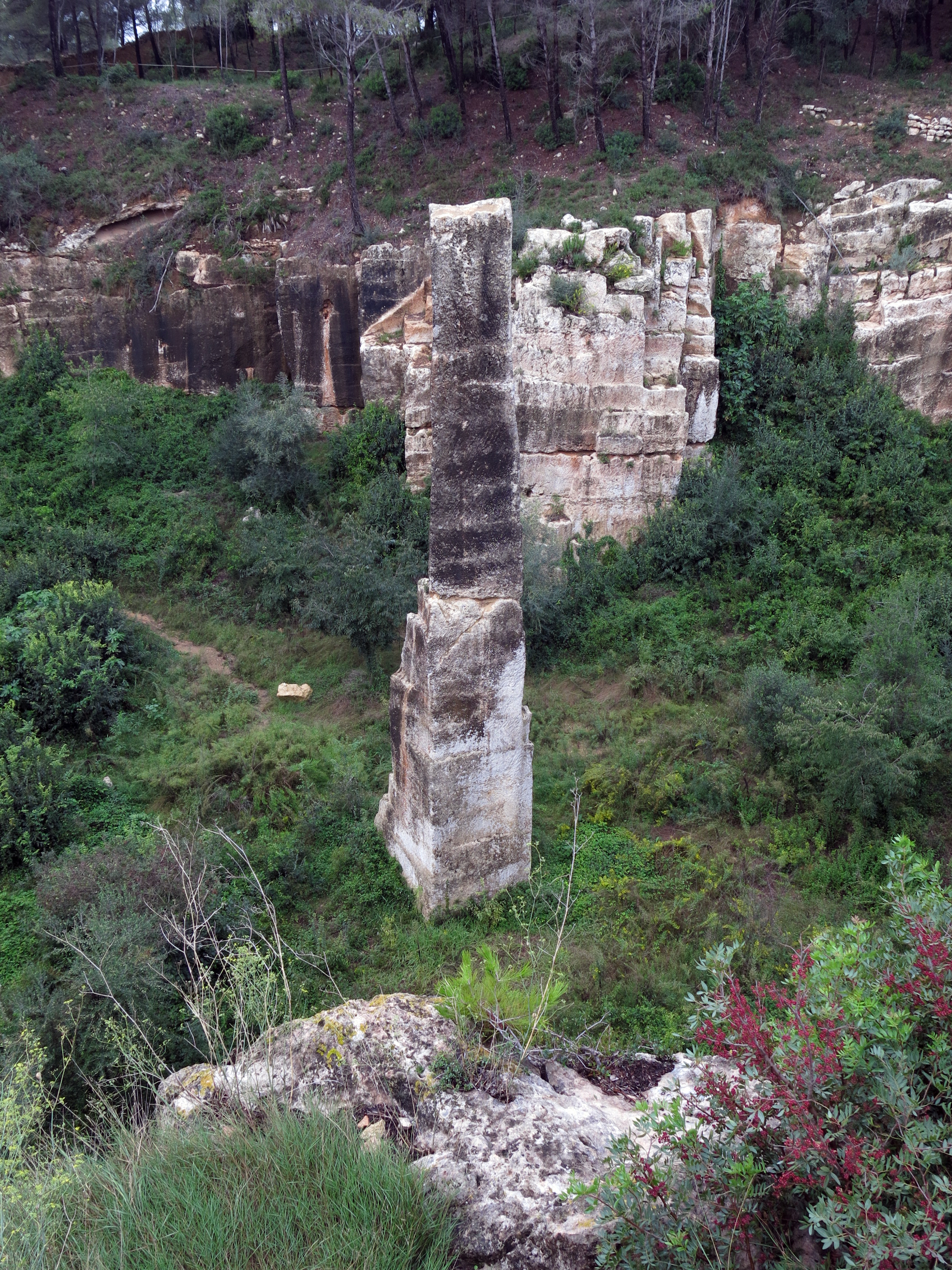 Pedrera romana del Mèdol